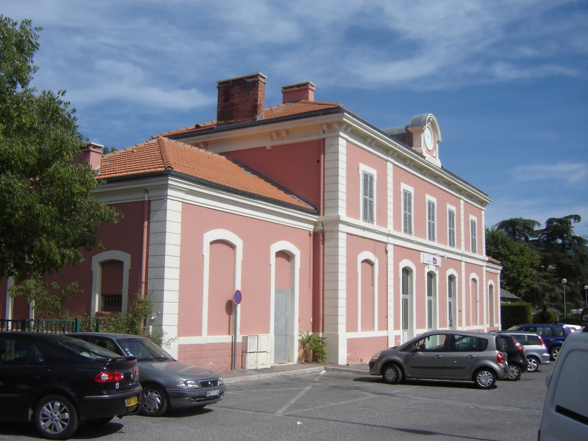 Gare d'Apt, Vaucluse, France